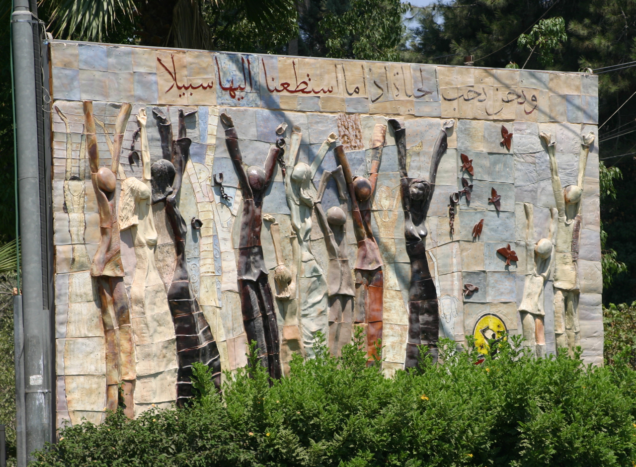 Ramallah, Palästina.